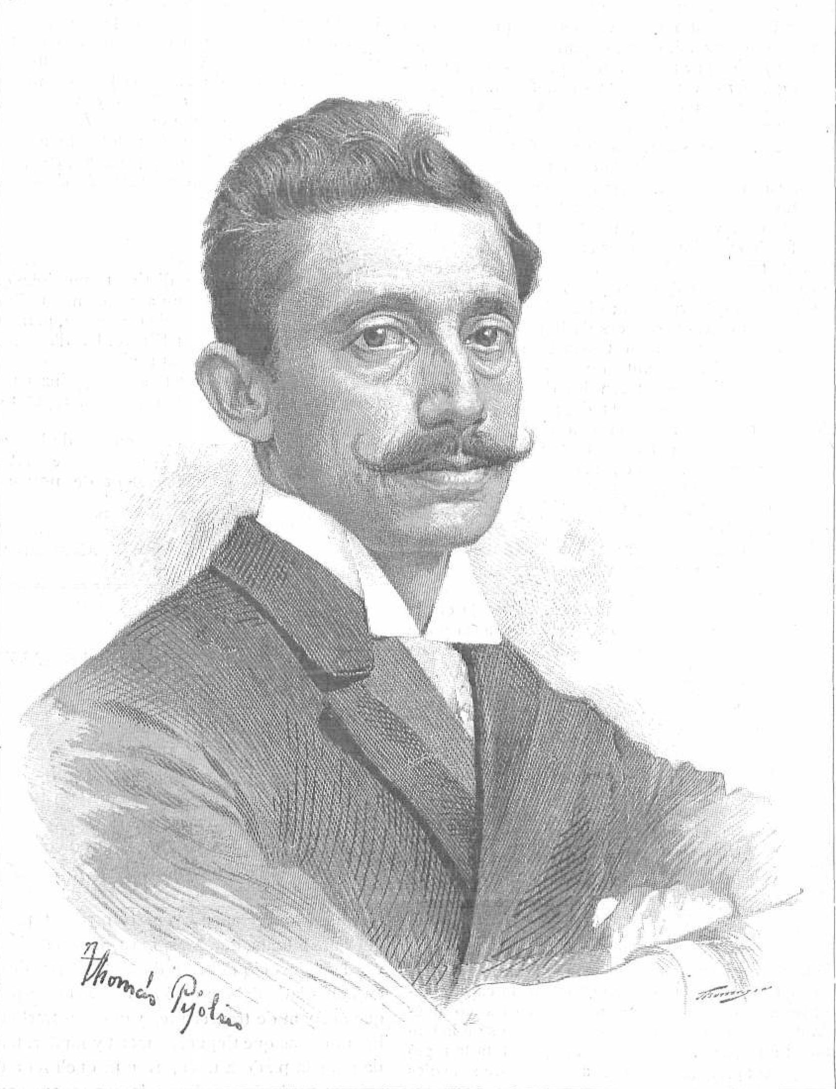 Don Marian Fuster y Fuster.